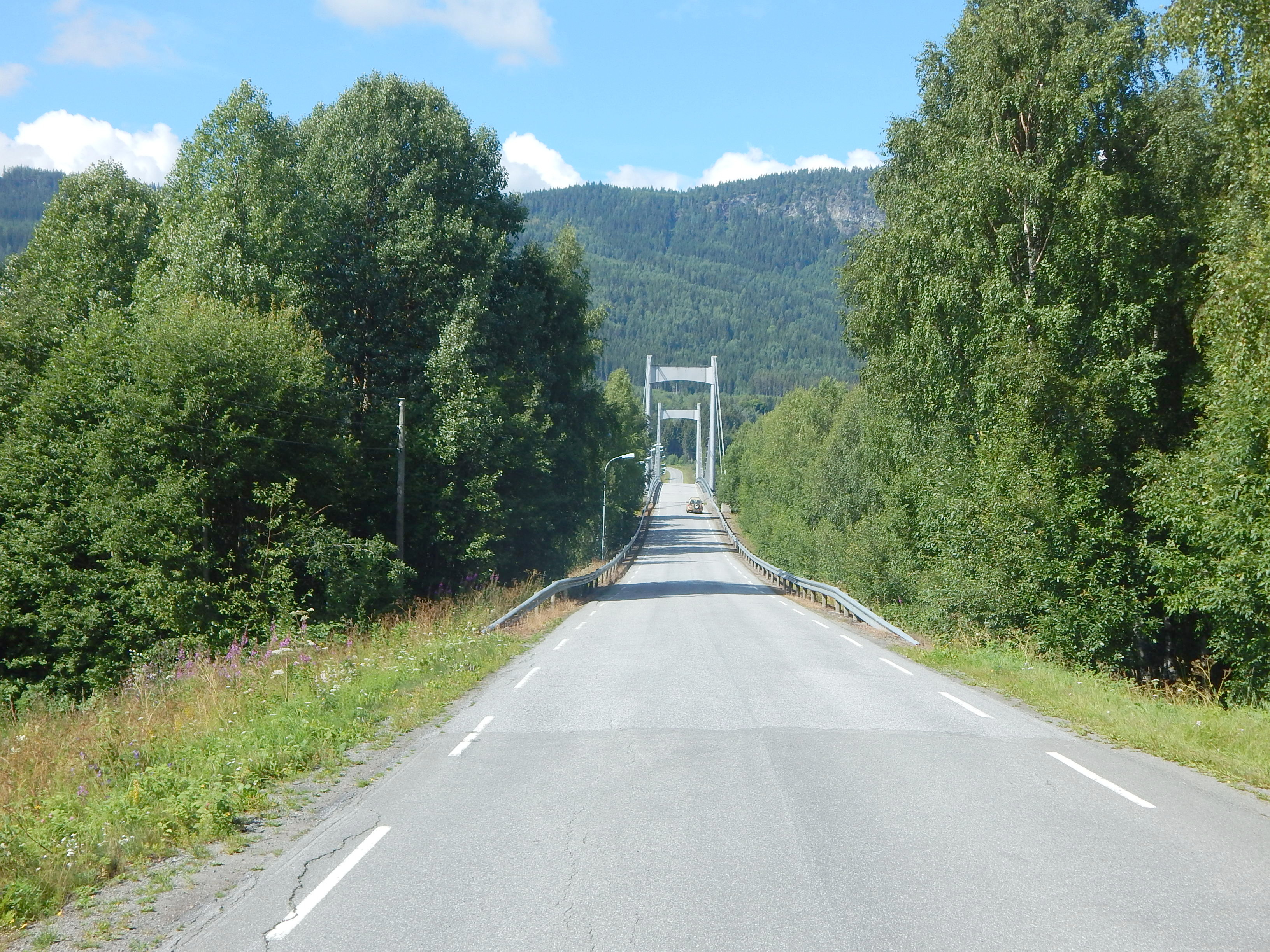 Fylkesvei 139 over Fluberg bru